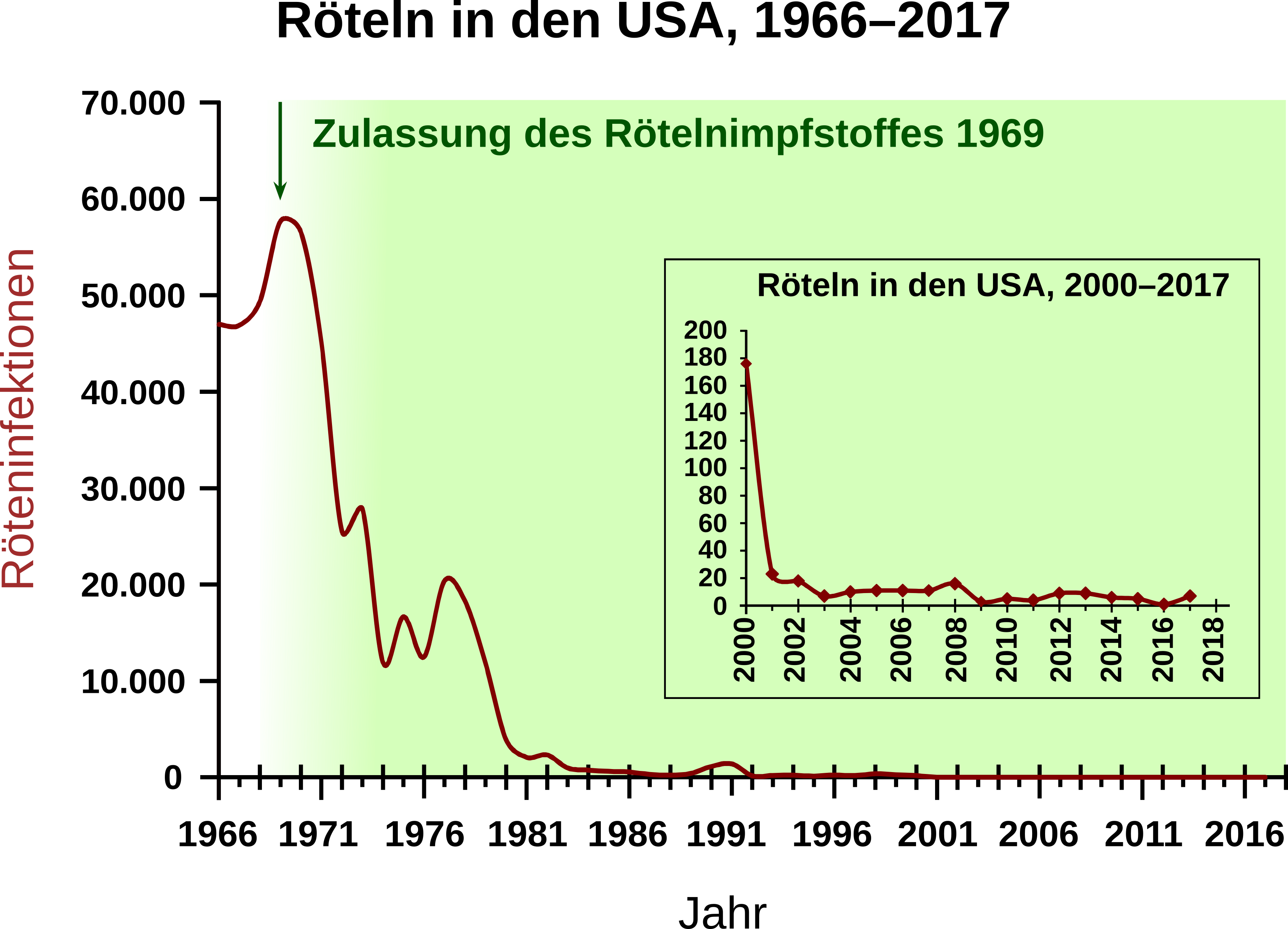 Röteln in den USA 1966-2017 1966-2016: CDC (file) also 1966-1993: MMVR 1993: 2017: WHO